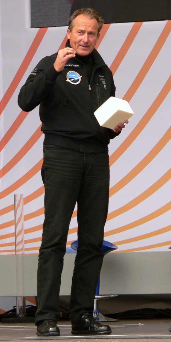 Andre Borschberg bei der IdeenExpo in Hannover